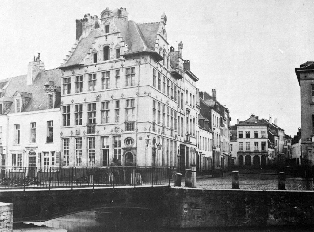 Marché aux porcs vers 1865